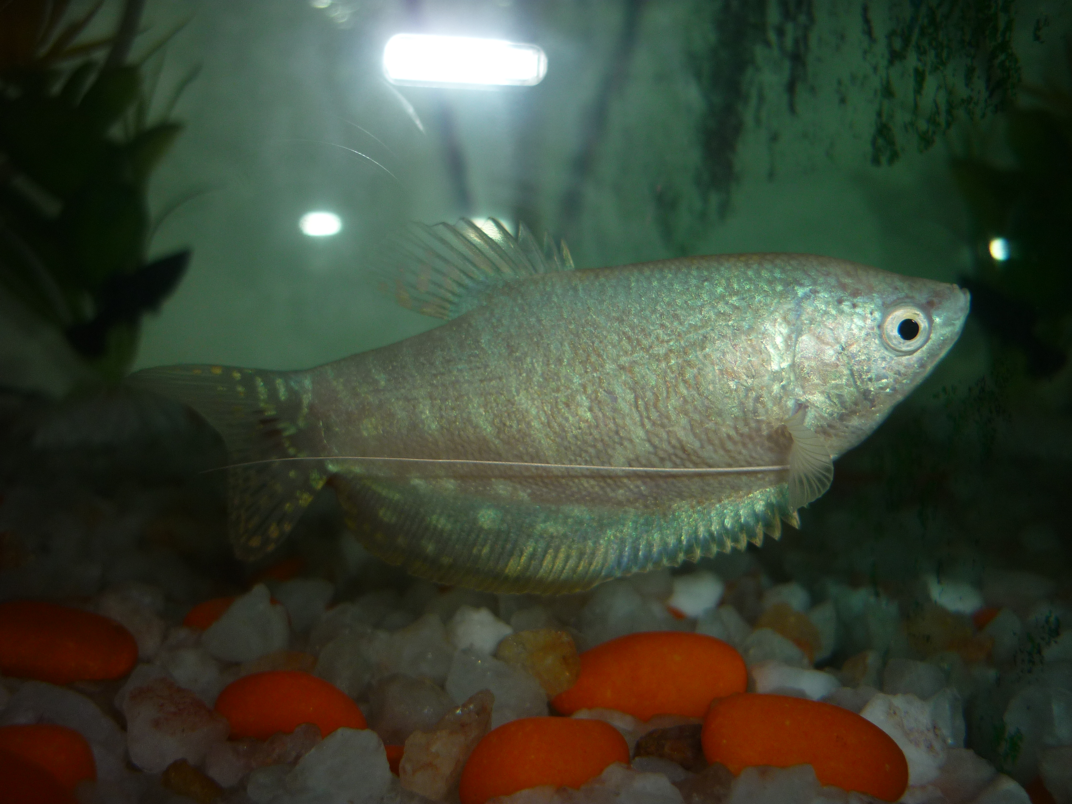 ഗൌര ഒരു അലങ്കാര മത്സ്യമാണ്